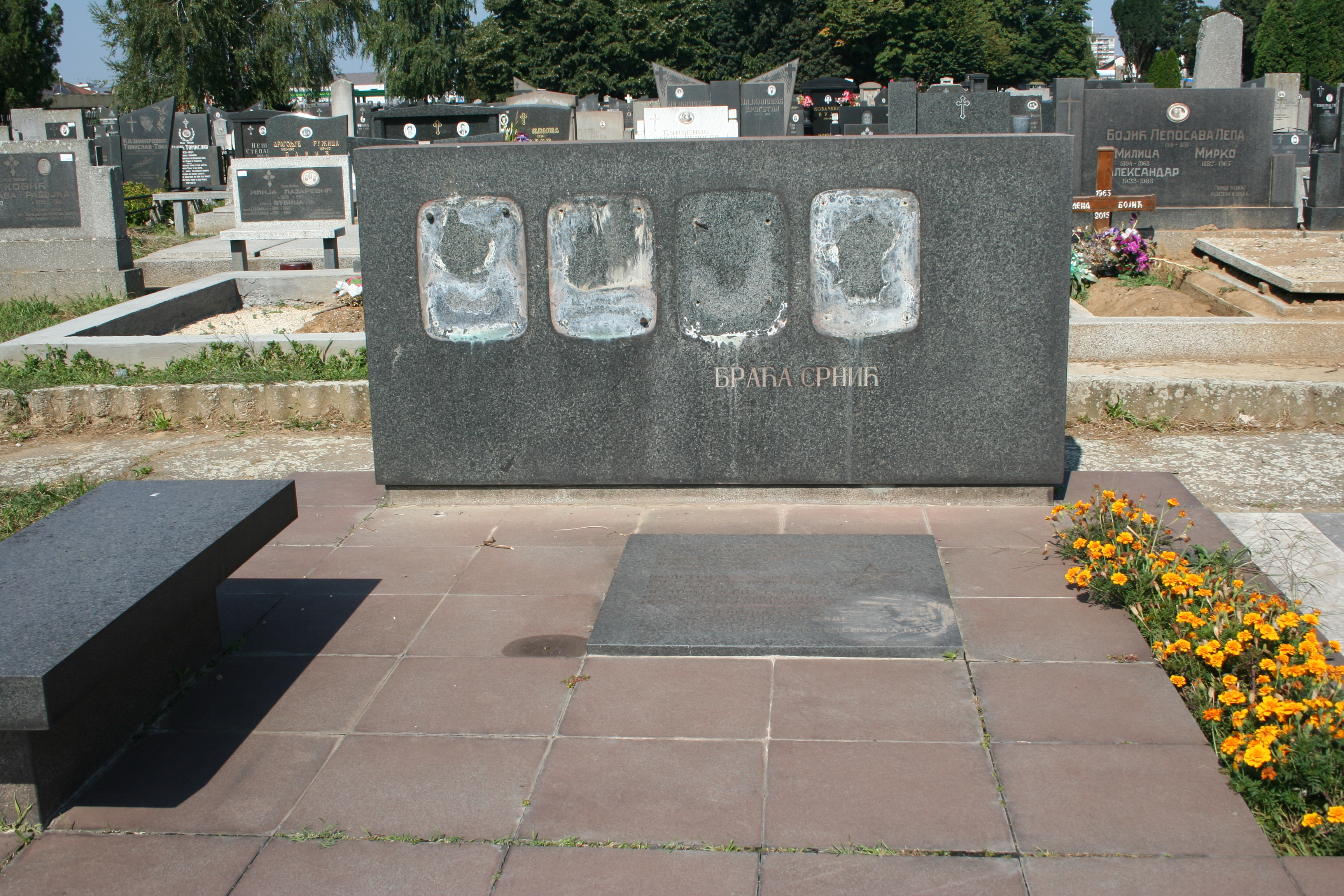 Grobovi braće Srnić u aleji nosilaca Partizanske spomenice 1941. i prvoboraca NOB-a na Donjošorskom groblju u Šapcu.